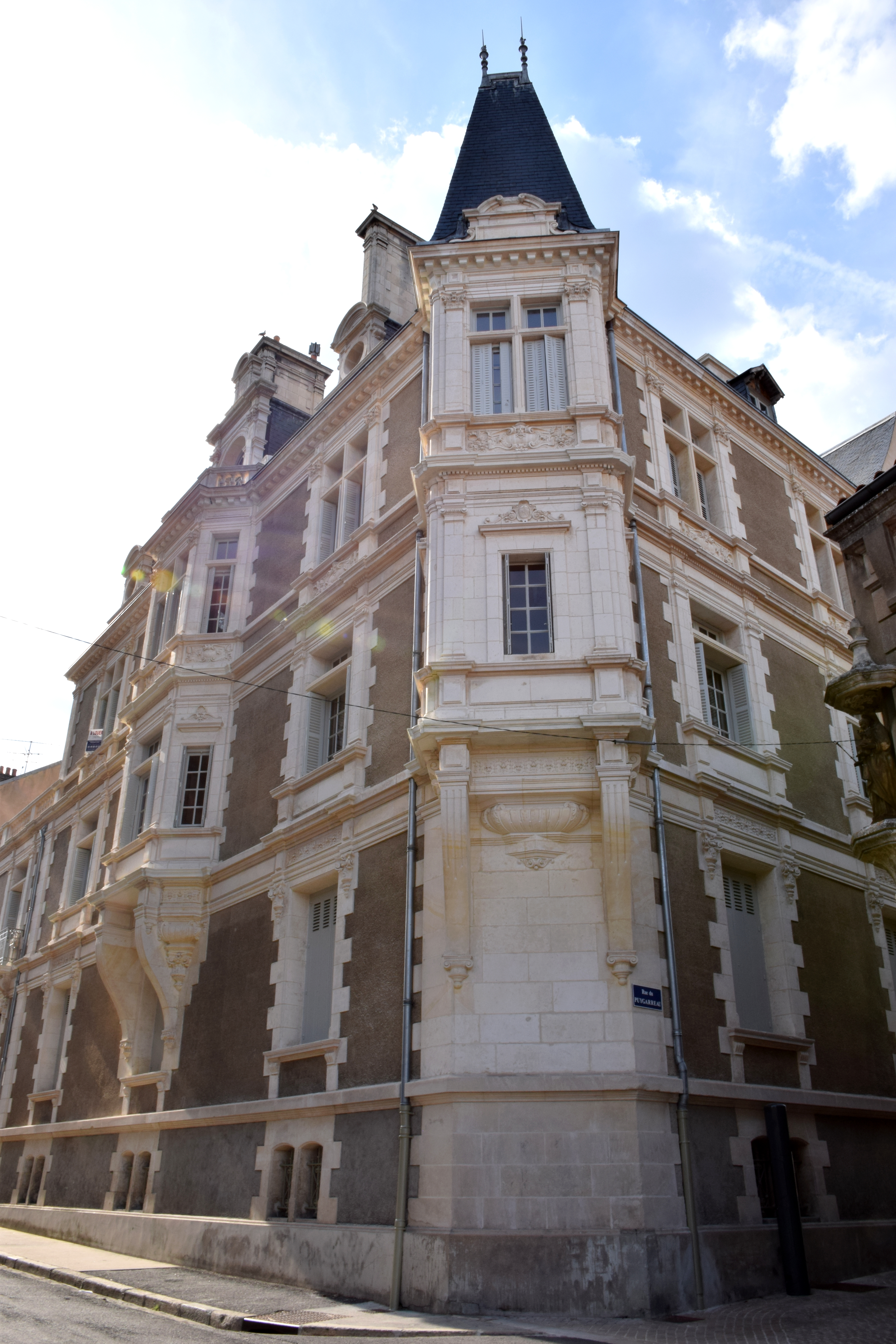 Hôtel Jean Beaucé (après rénovation), façade à l'angle des rues Louis-Renard et Puygarreau. .